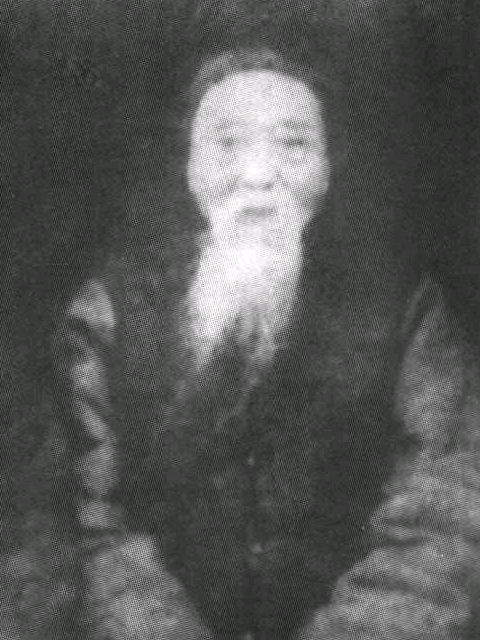 王闿运的照片，其人1916年去世。